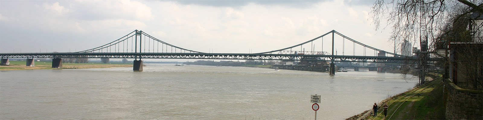 Rheinbrücke Uerdingen - bridge over the river rhine connecting Krefeld-Uerdingen with Duisburg-Mündelheim, Germany date: 28th April 2005